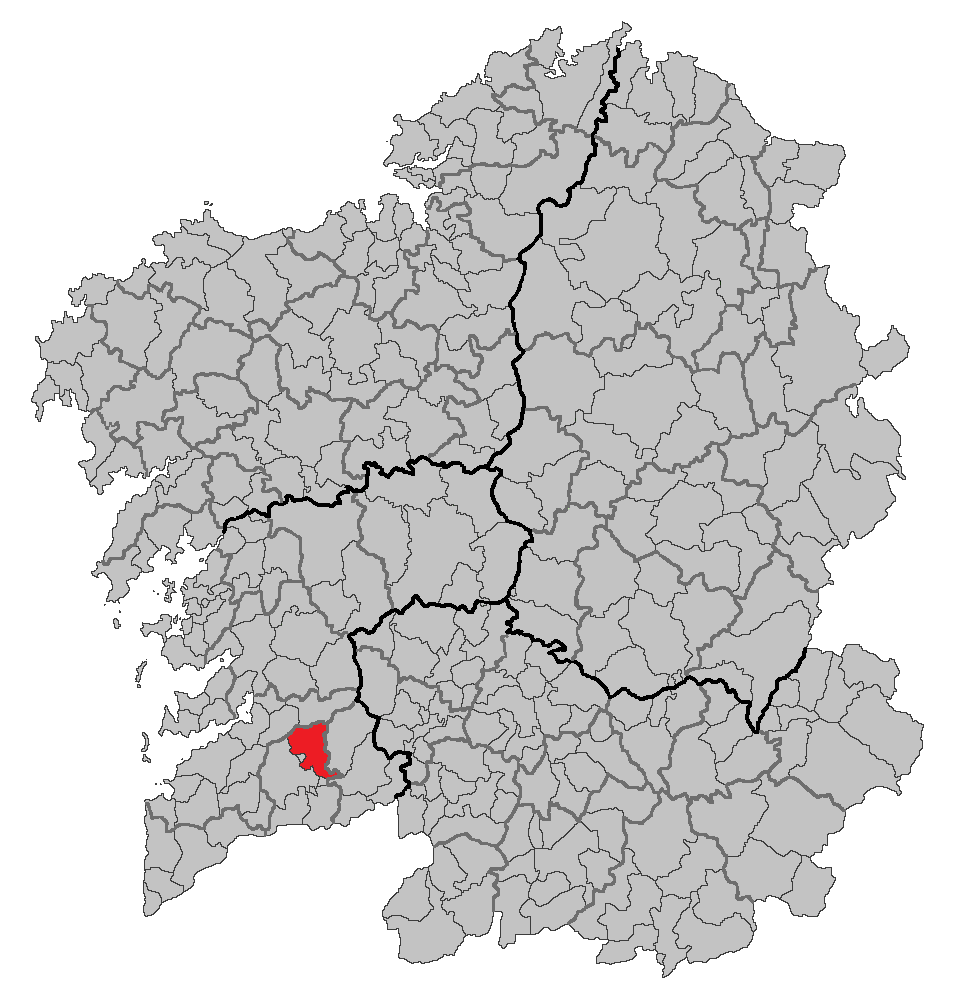 Mapa coa localización do concello de Mondariz.